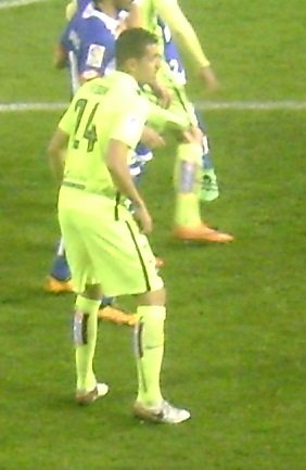 Feddal